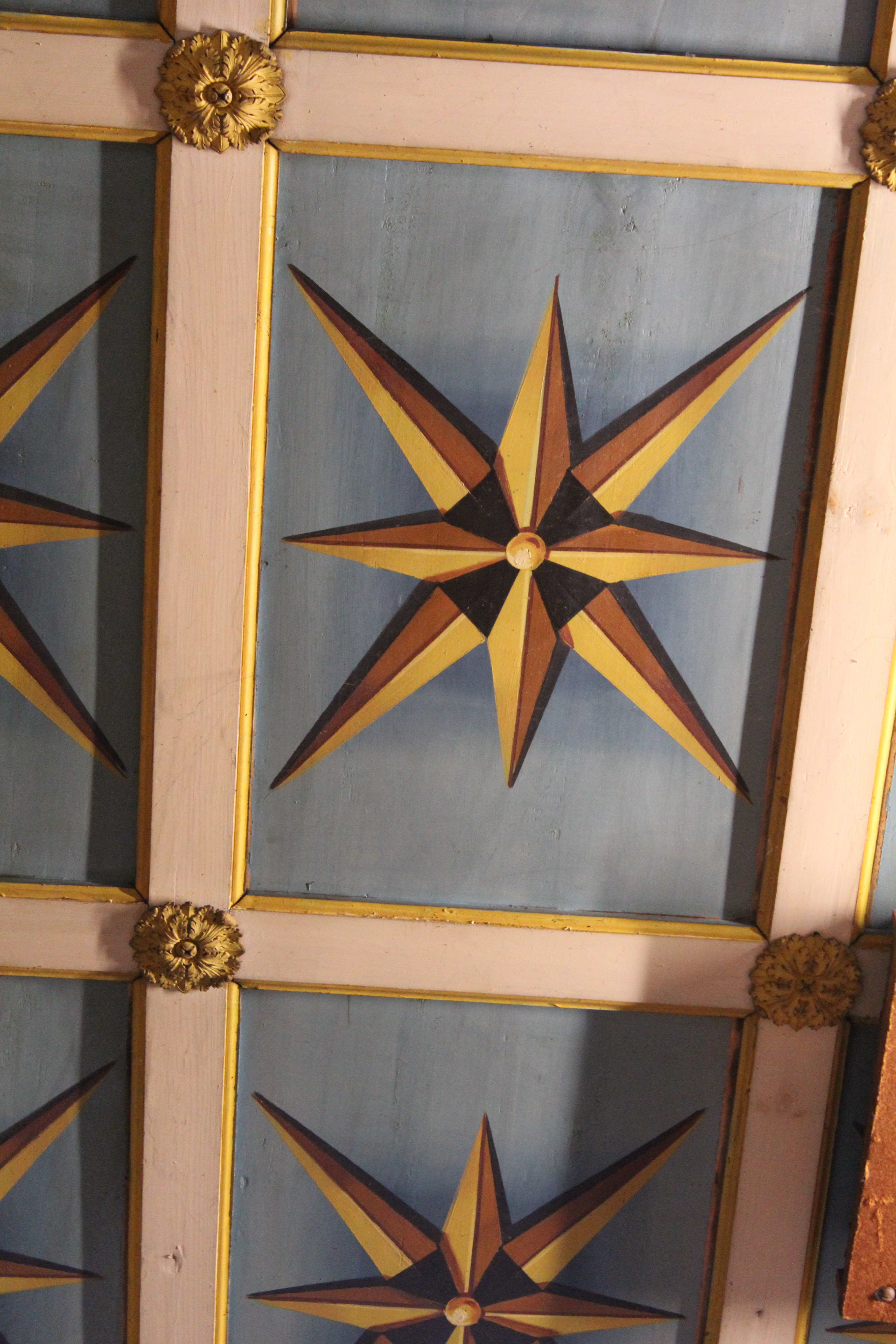 Kassettendecke der Evangelischen Kirche Wißmar, Gemeinde Wettenberg, Landkreis Gießen, Hessen, Deutschland; alte Farbgebung, so nur noch im Innern des Orgelgehäuses erhalten